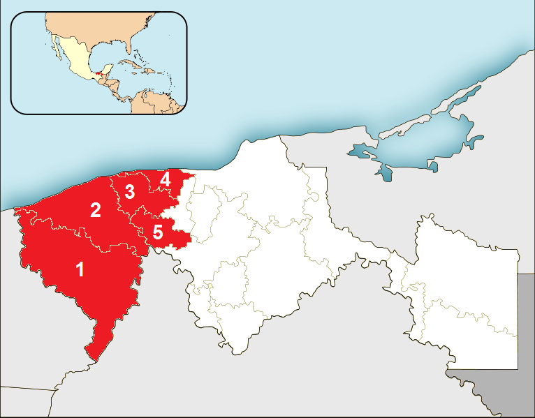 Mapa de la Sub Región de la Chontalpa, en el estado de Tabasco